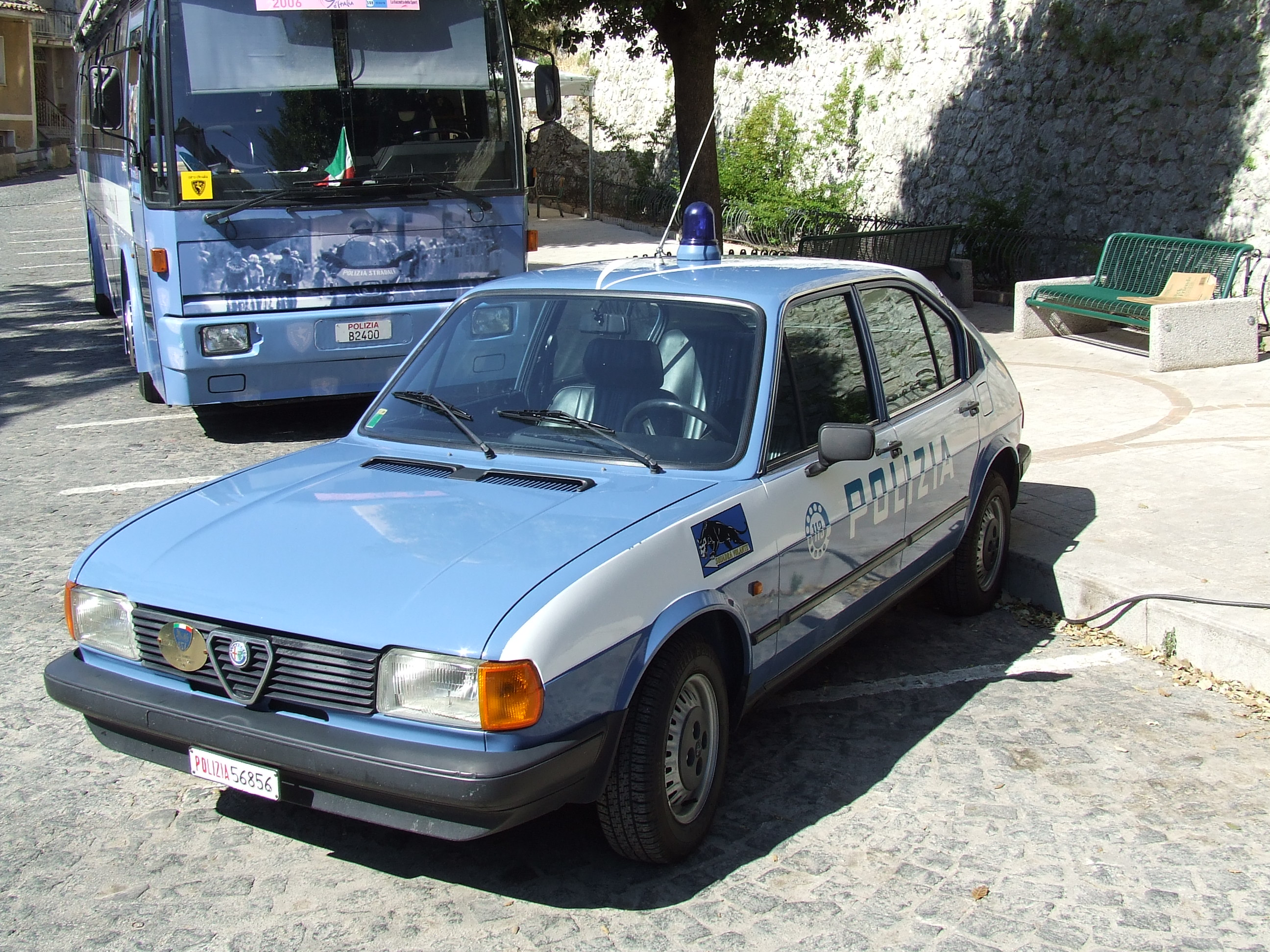 Alfa Sud